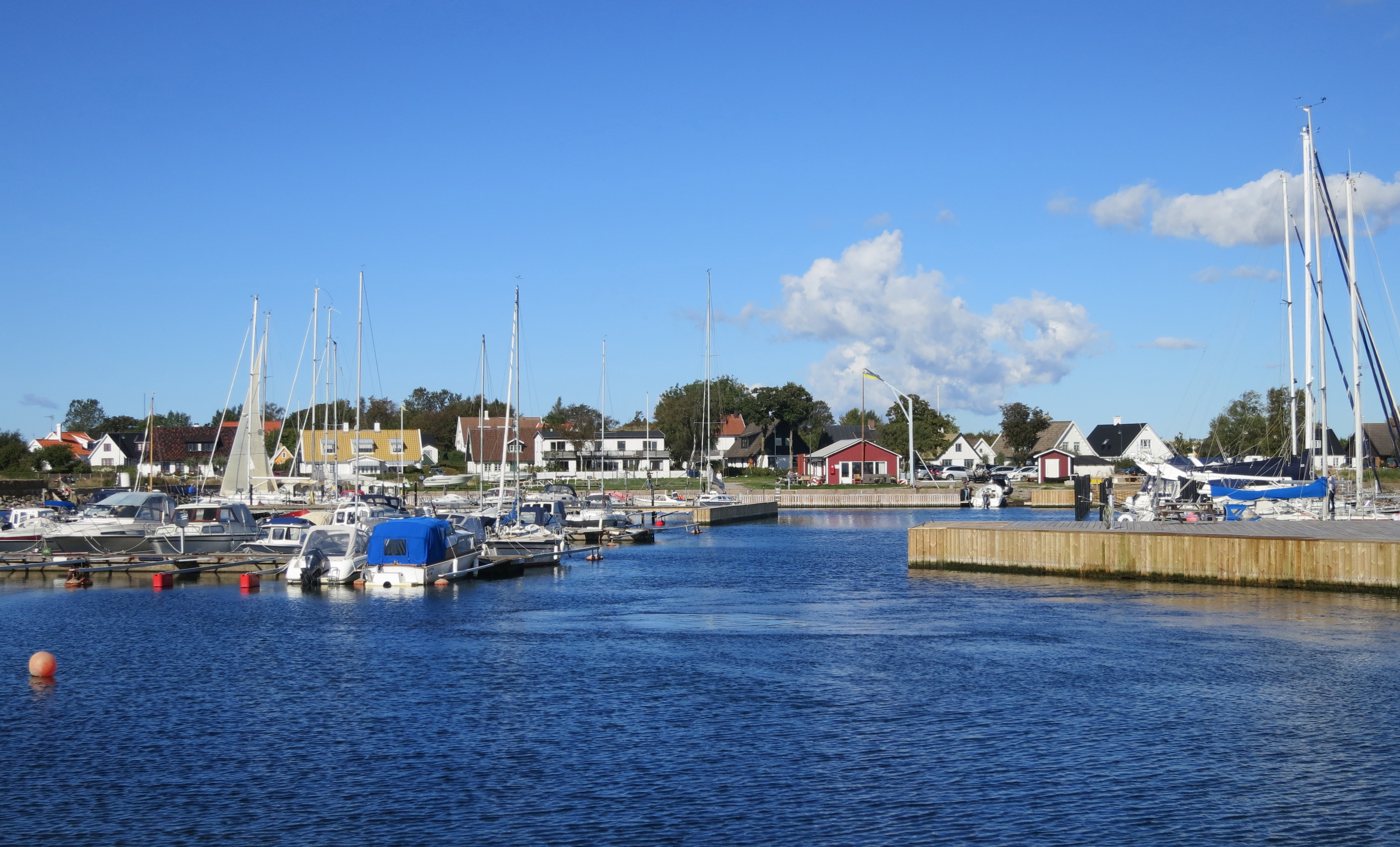 Vikhögs hamn